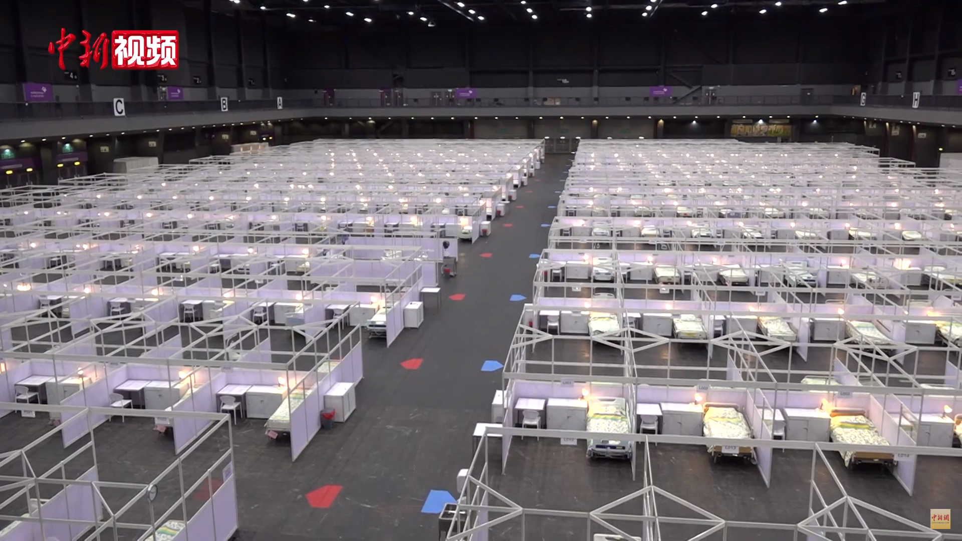 “港版方舱医院”正式启用 电子手段降低病毒传播风险